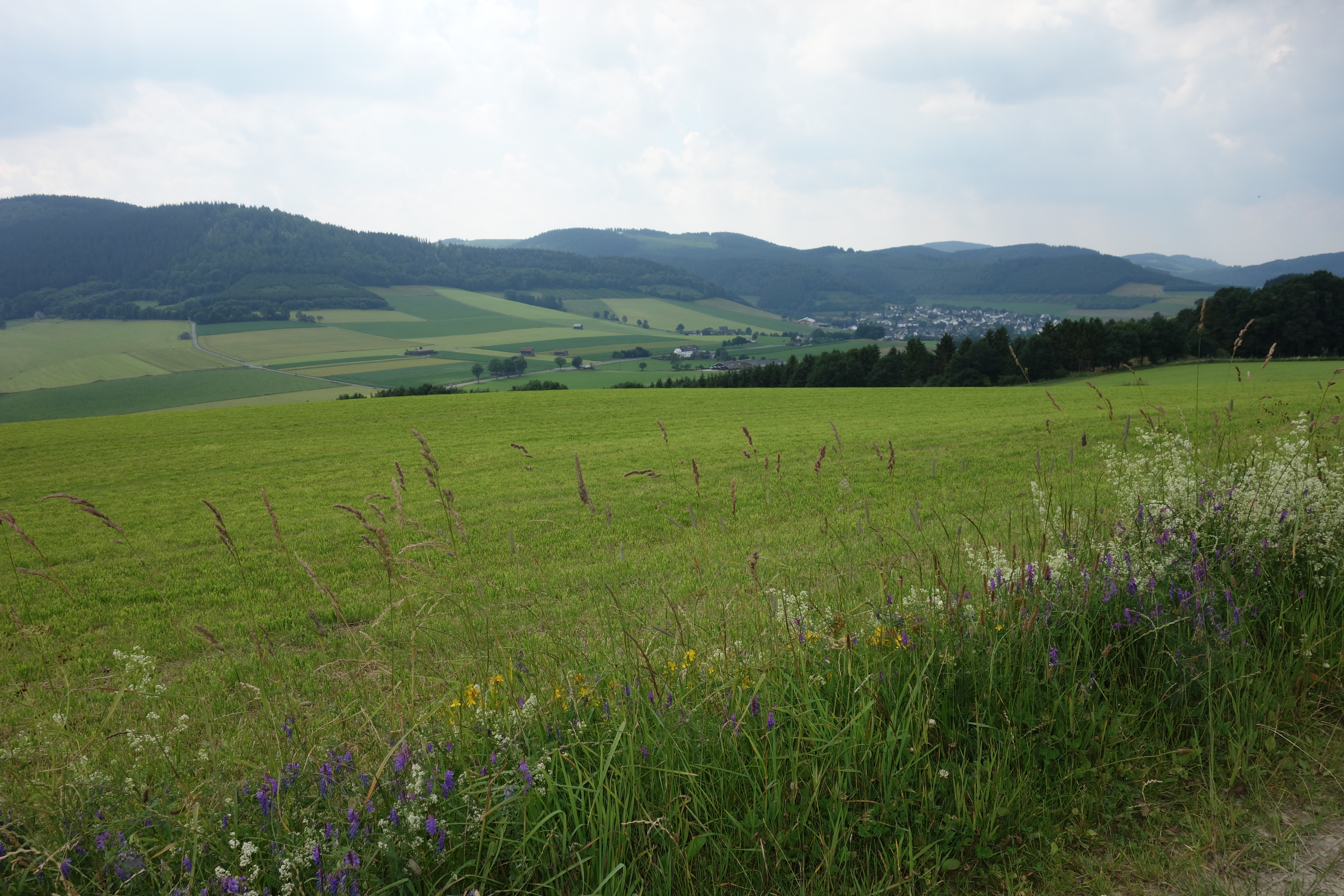 Landschaftsschutzgebiet Bödefelder Mulde im Stadtgebiet Schmallenberg, Wald im Hintergrund gehört zum Landschaftsschutzgebiet Schmallenberg. Blick von Nordosten auf Bödefeld.